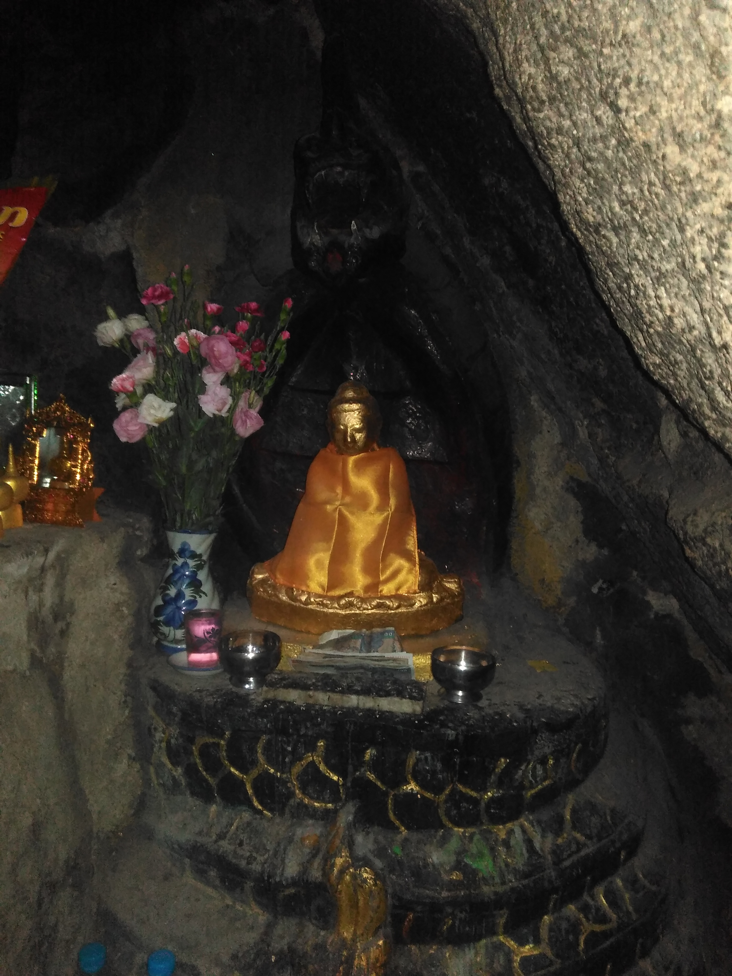 မြန်မာဘာသာ: ကျီးပါးစပ်ဂူအတွင်းရှိ ဗုဒ္ဓရုပ်ပွားတော်။ မွန်ပြည်နယ်၊ ကျိုက်ထိုမြို့၊ ကျိုက်ထီးရိုးသာသနာ့နယ်မြေ၊ ကျီးပါးစပ်ဂူအဆုံးနေရာတွင် တည်ရှိသည်။